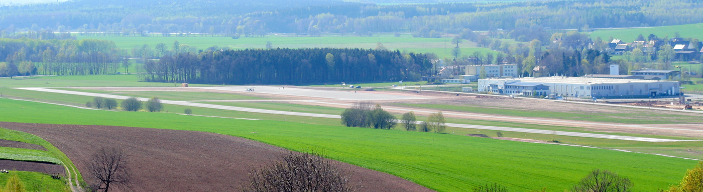 Übersicht über den Jahnsdorfer Flugplatz